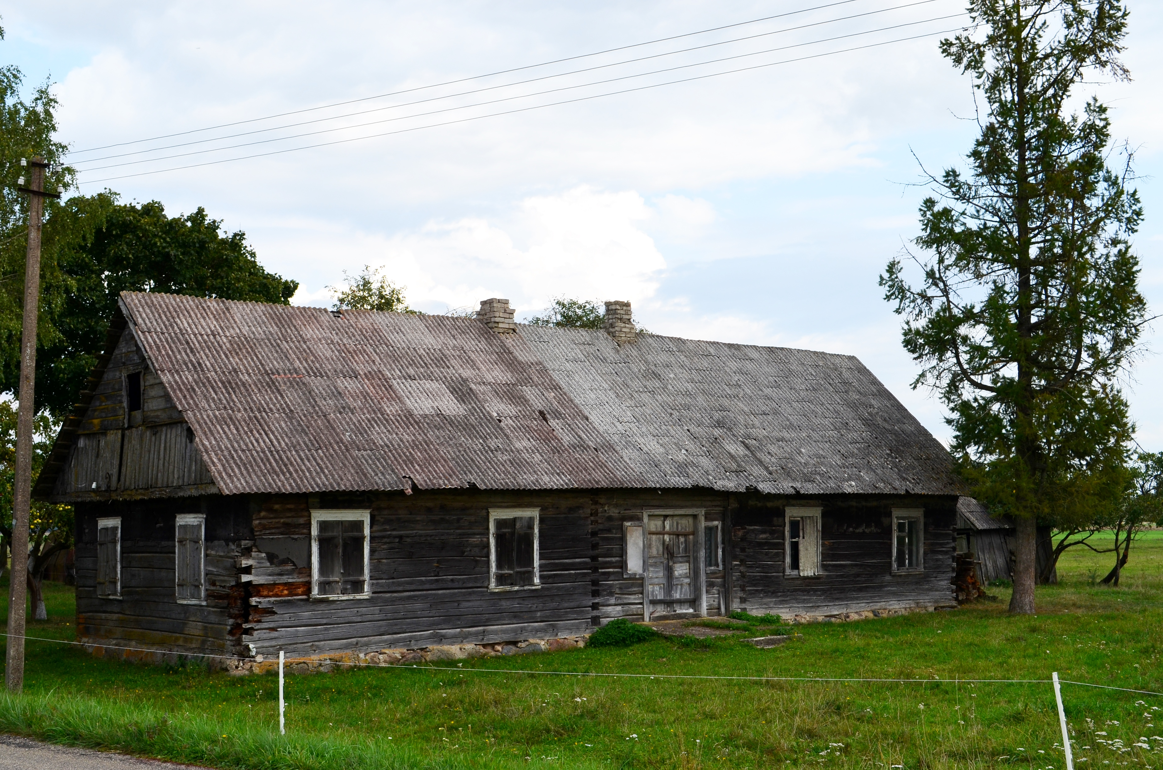 Gryčia Šmotiškiuose, Kėdainių raj.